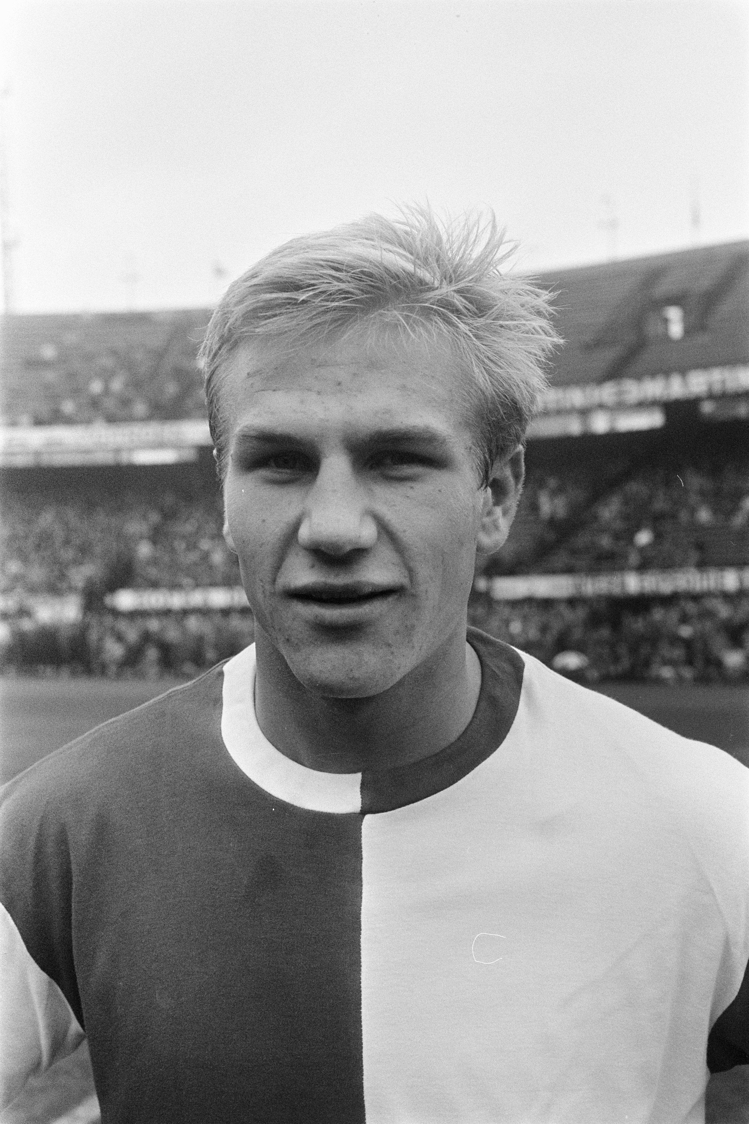 Feyenoord-speler Johan Boskamp